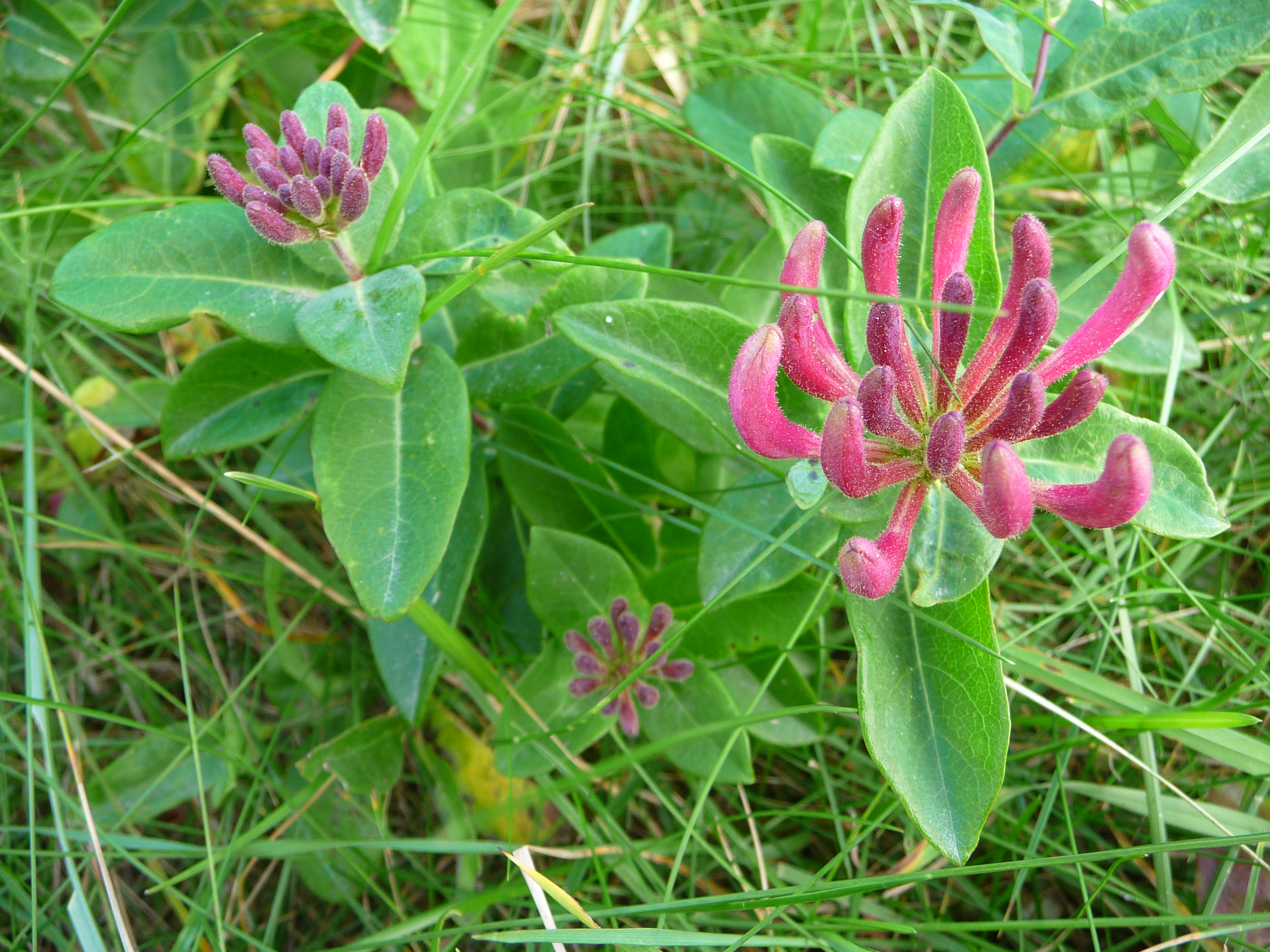 Geschlossene Blüten des Deutschen Geißblatts (Lonicera perclymenum), fotografiert auf der ostfriesischen Nordseeinsel Juist (Niedersachsen, Deutschland)